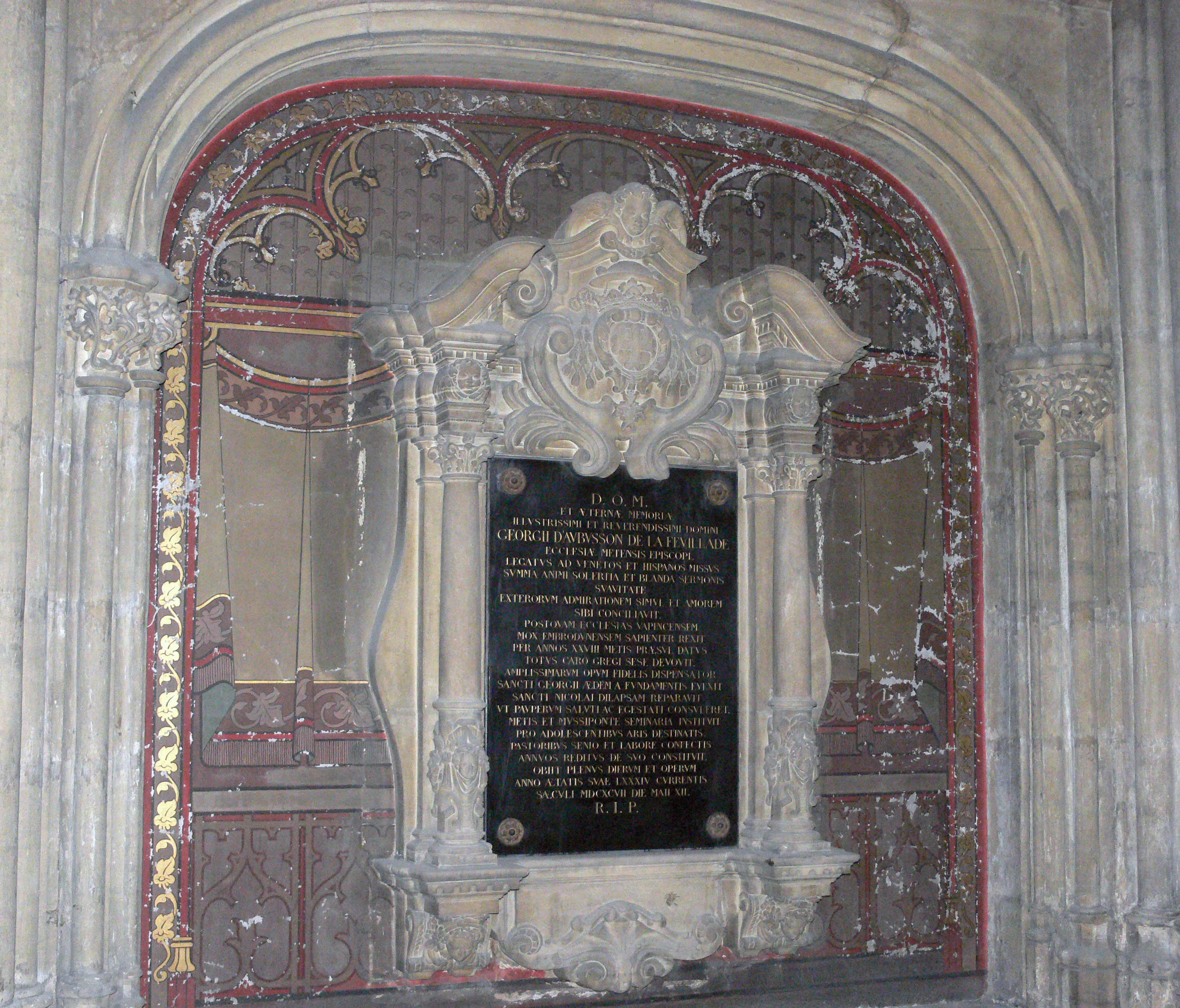 Tombeau de Georges d'Aubusson de La Feuillade (1609-1697), évêque de Metz, dans la cathédrale